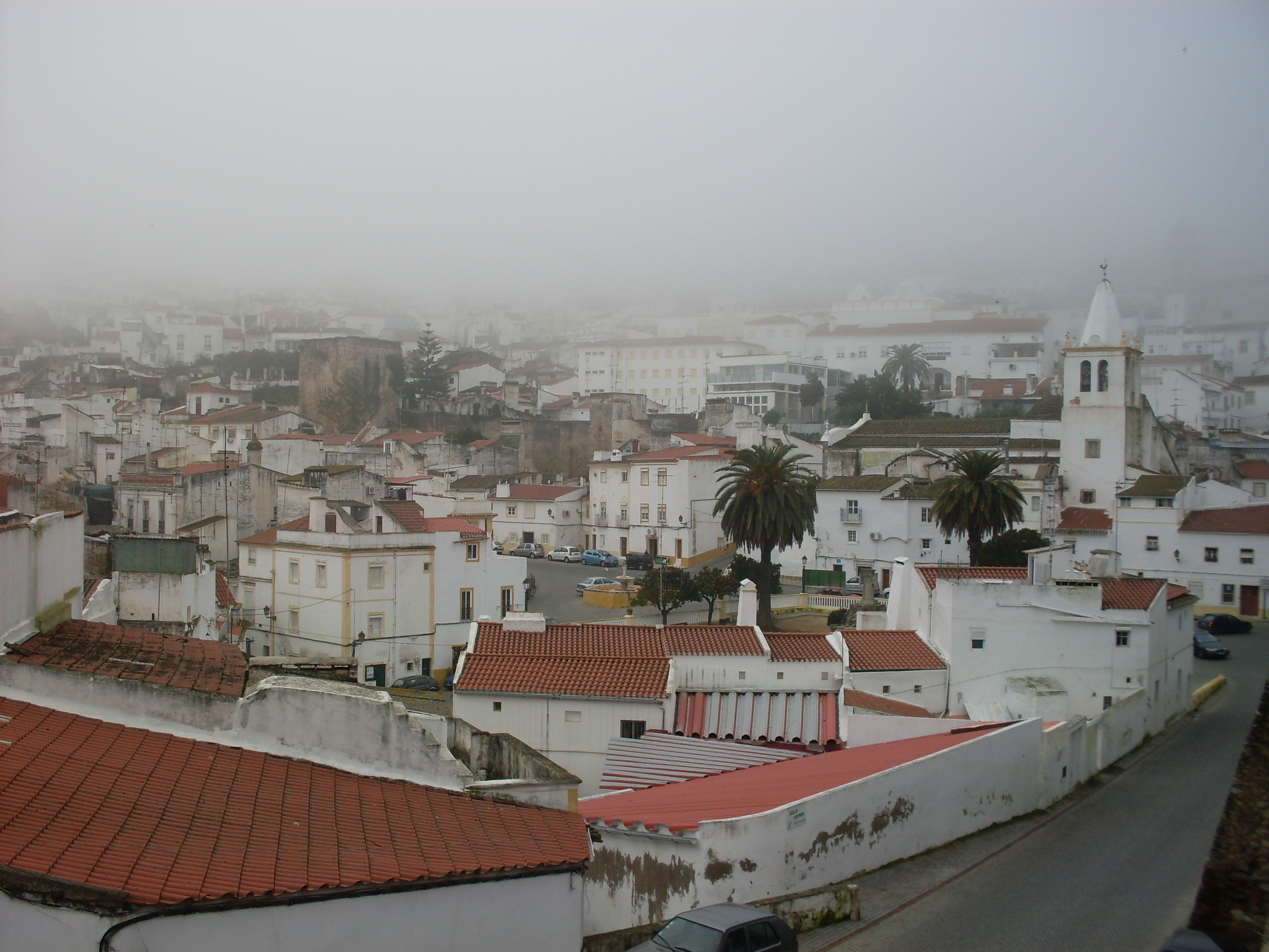 Elvas - Vista sobre a cidade nas muralhas perto da Porta de São Vicente